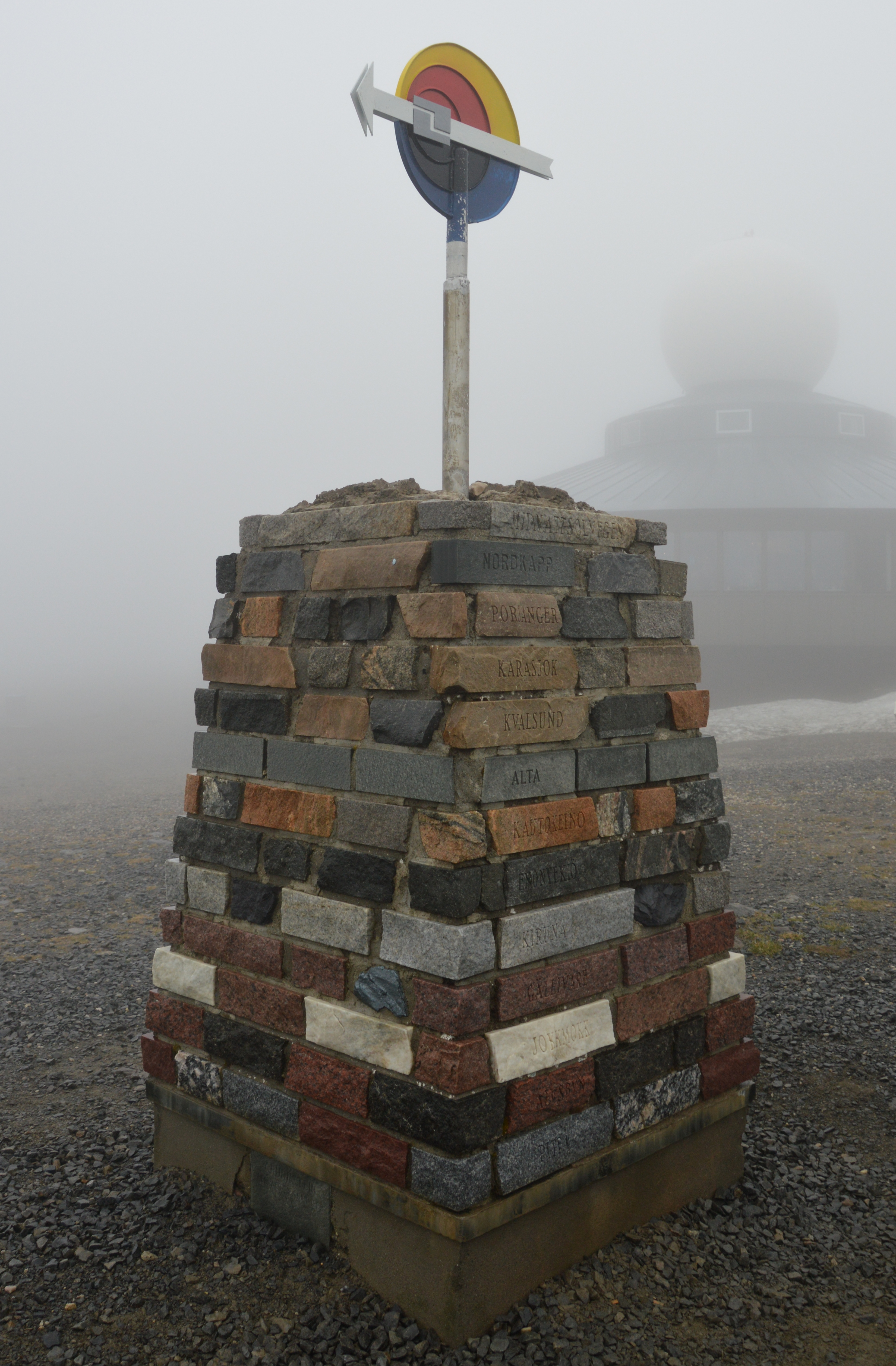 Mitternachtssonnendenkmal